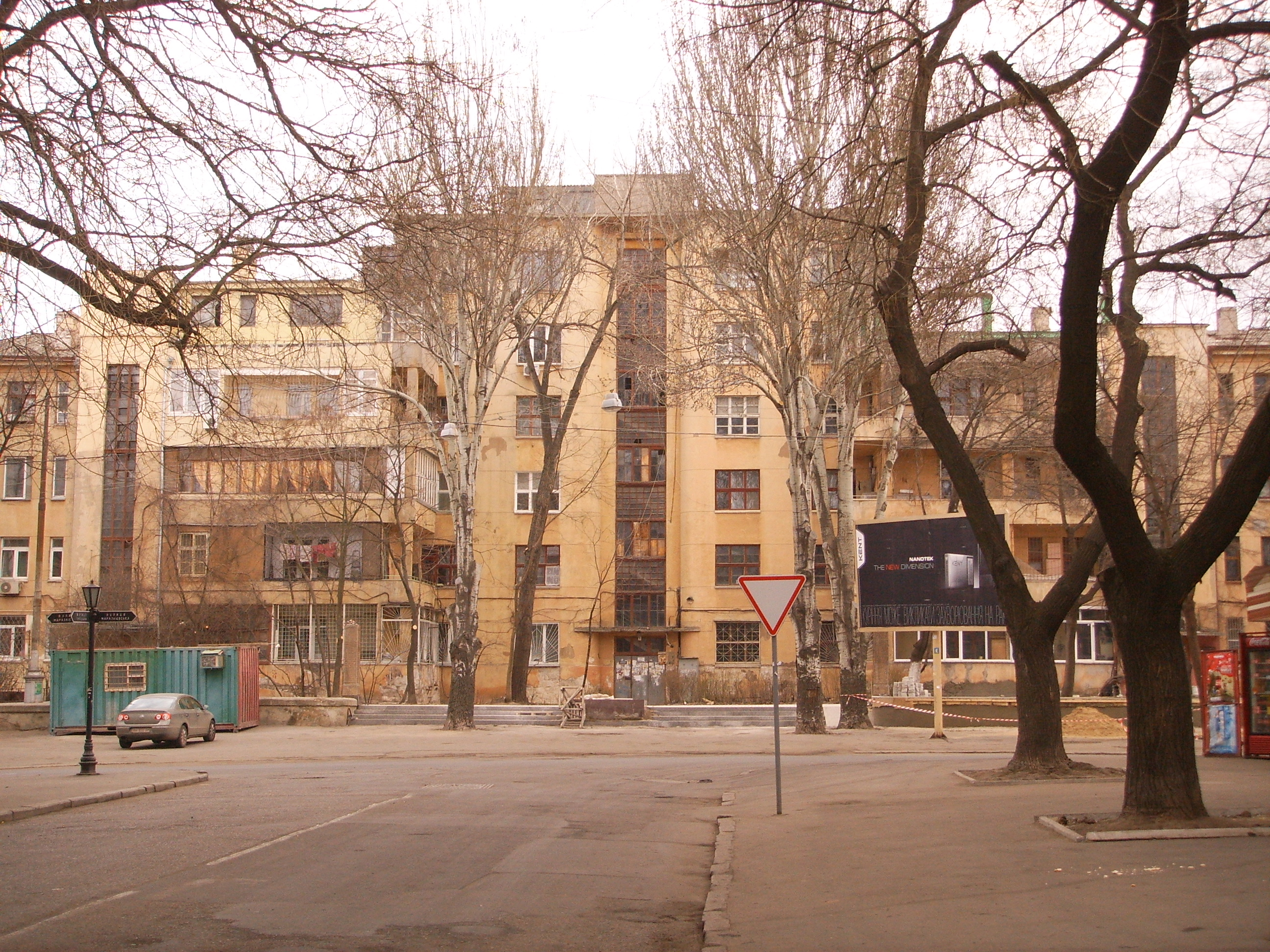 большой дом по ул. Маразлиевская, 1 а. Одесса. 1931 г.